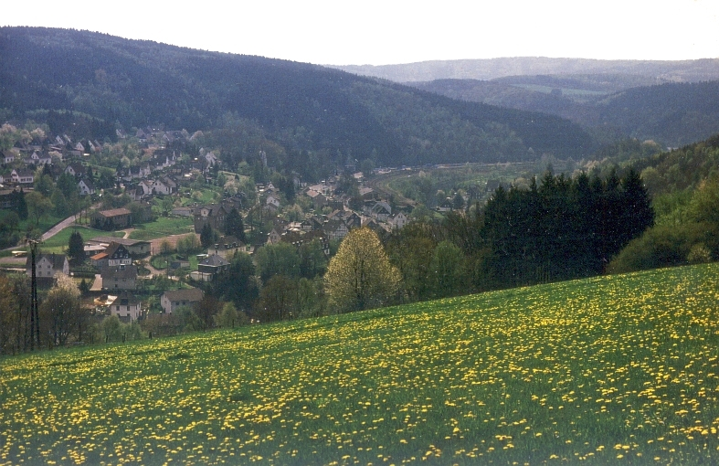 Osberghausen, Überblick von Ösinghausen aus andere Versionen: keine